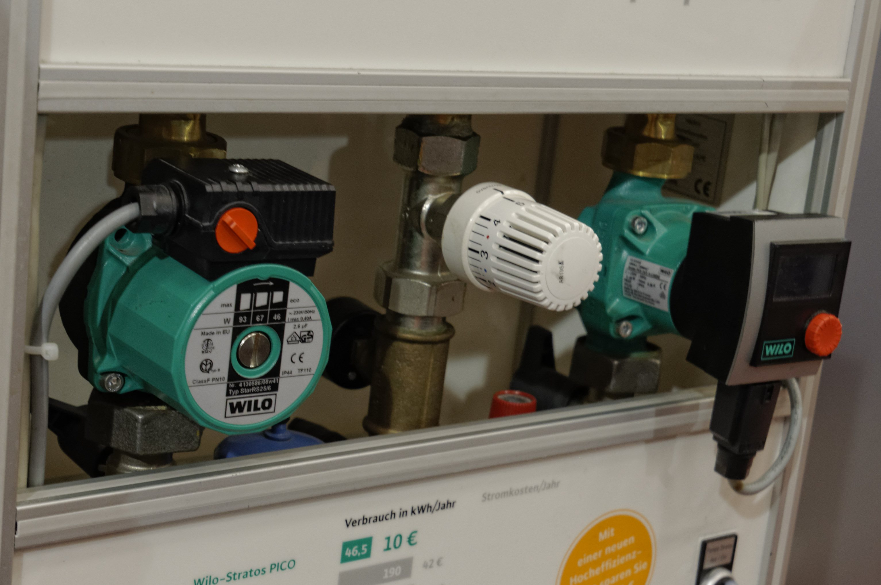 Sindelfingen Haus & Energie 2018